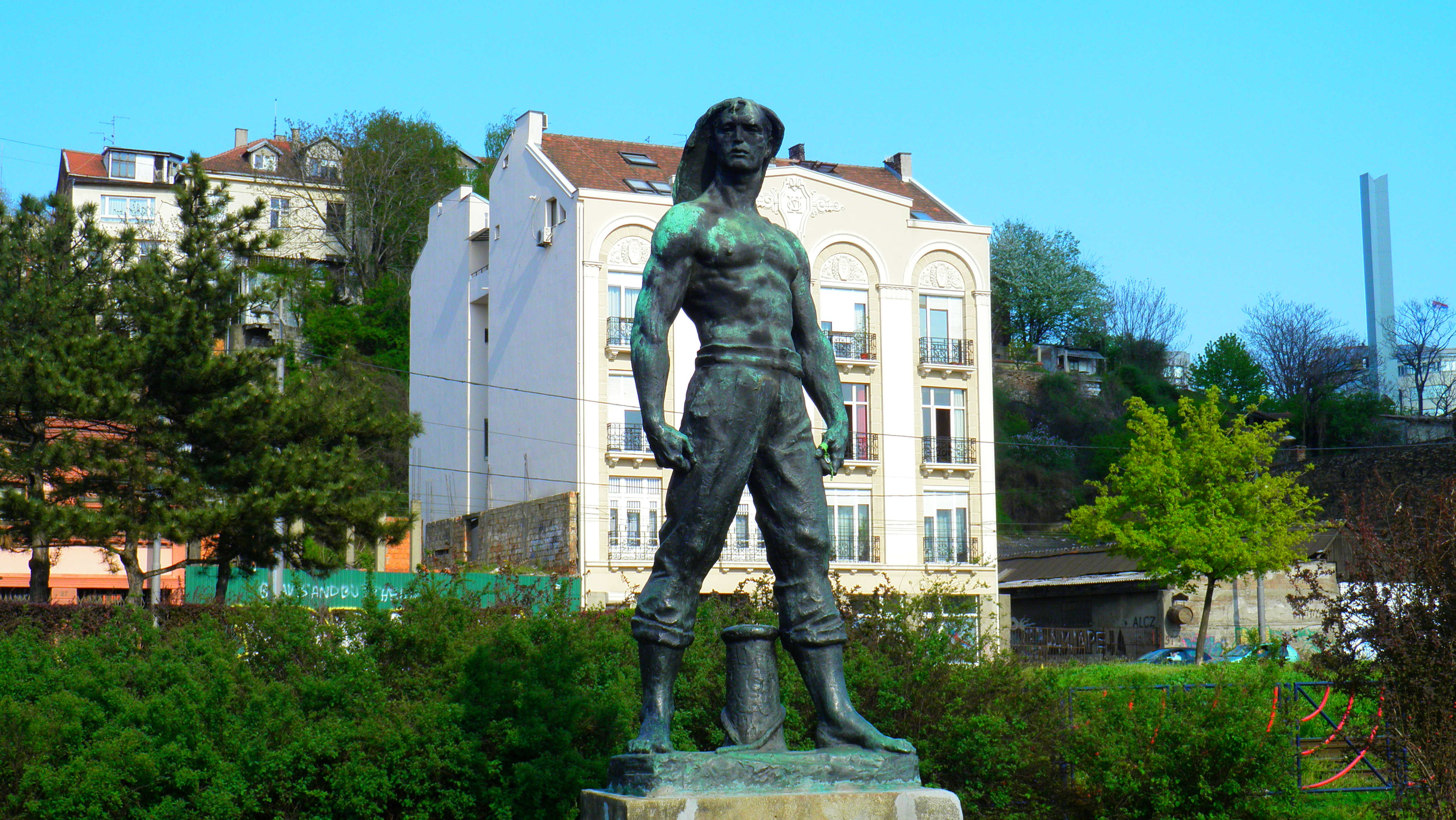 Spomenik obalskom radniku